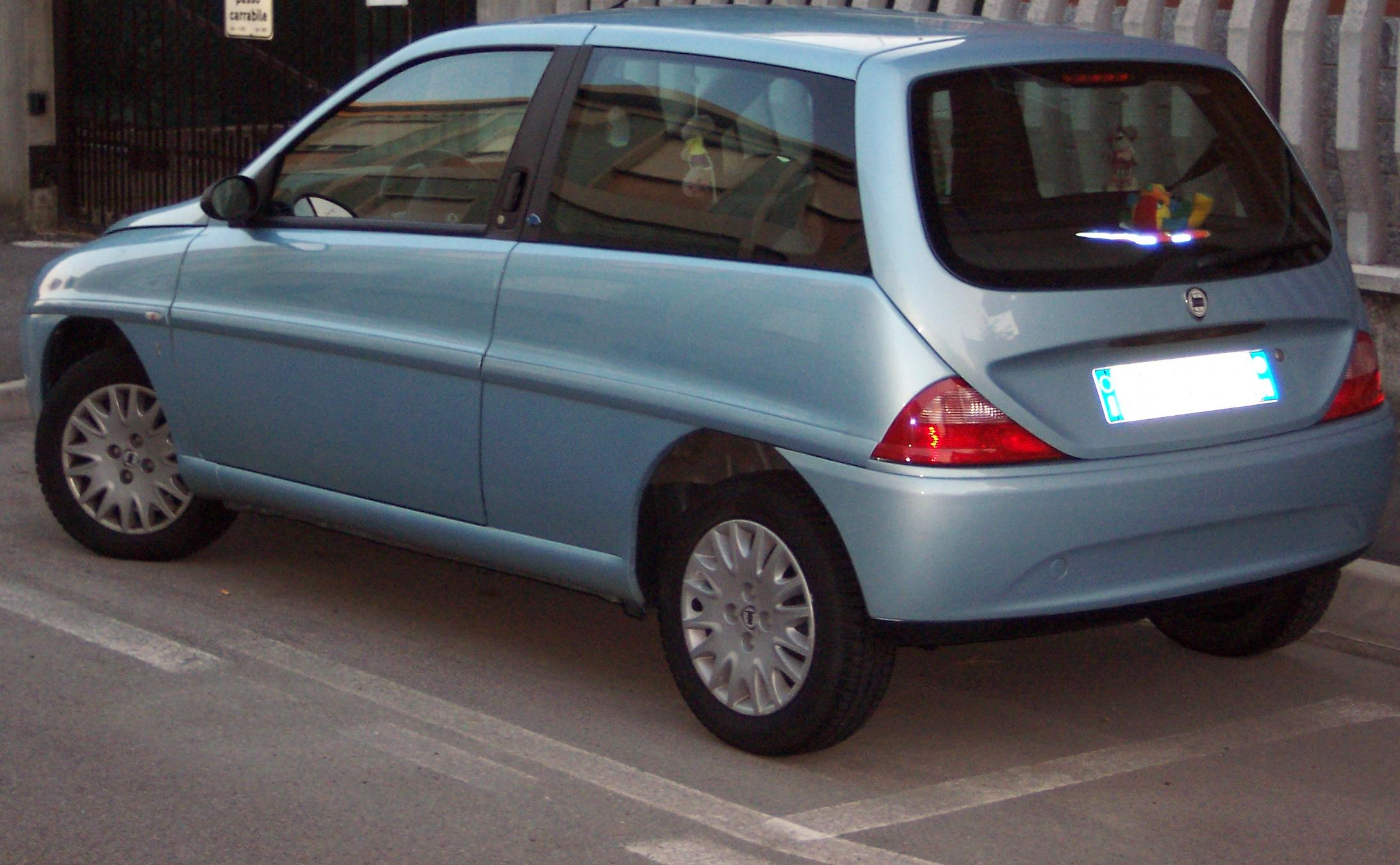 Lancia Y